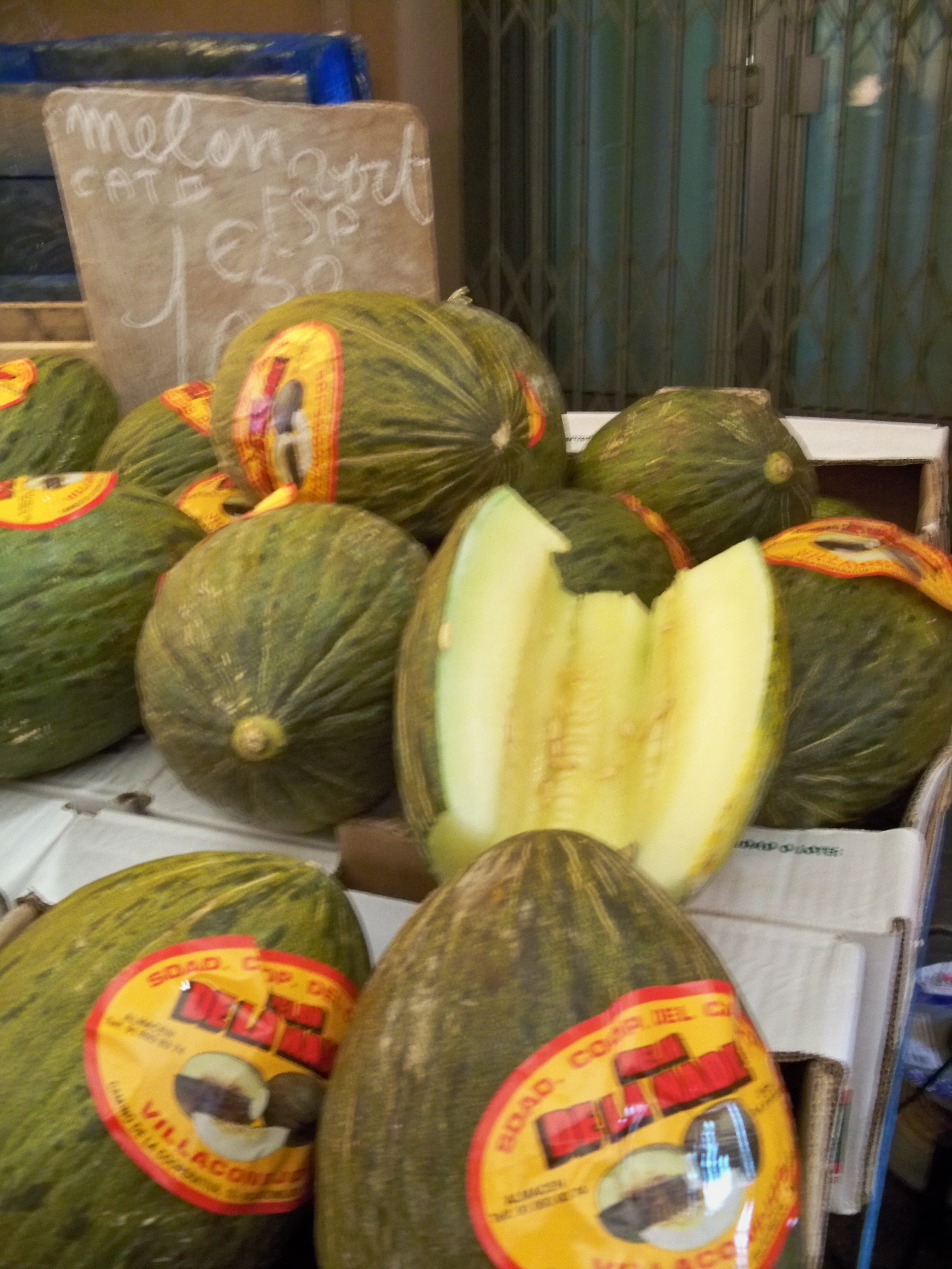 Melon sur le marché d'Apt (Cucumis melo 'Piñonet Piel de Sapo'?)